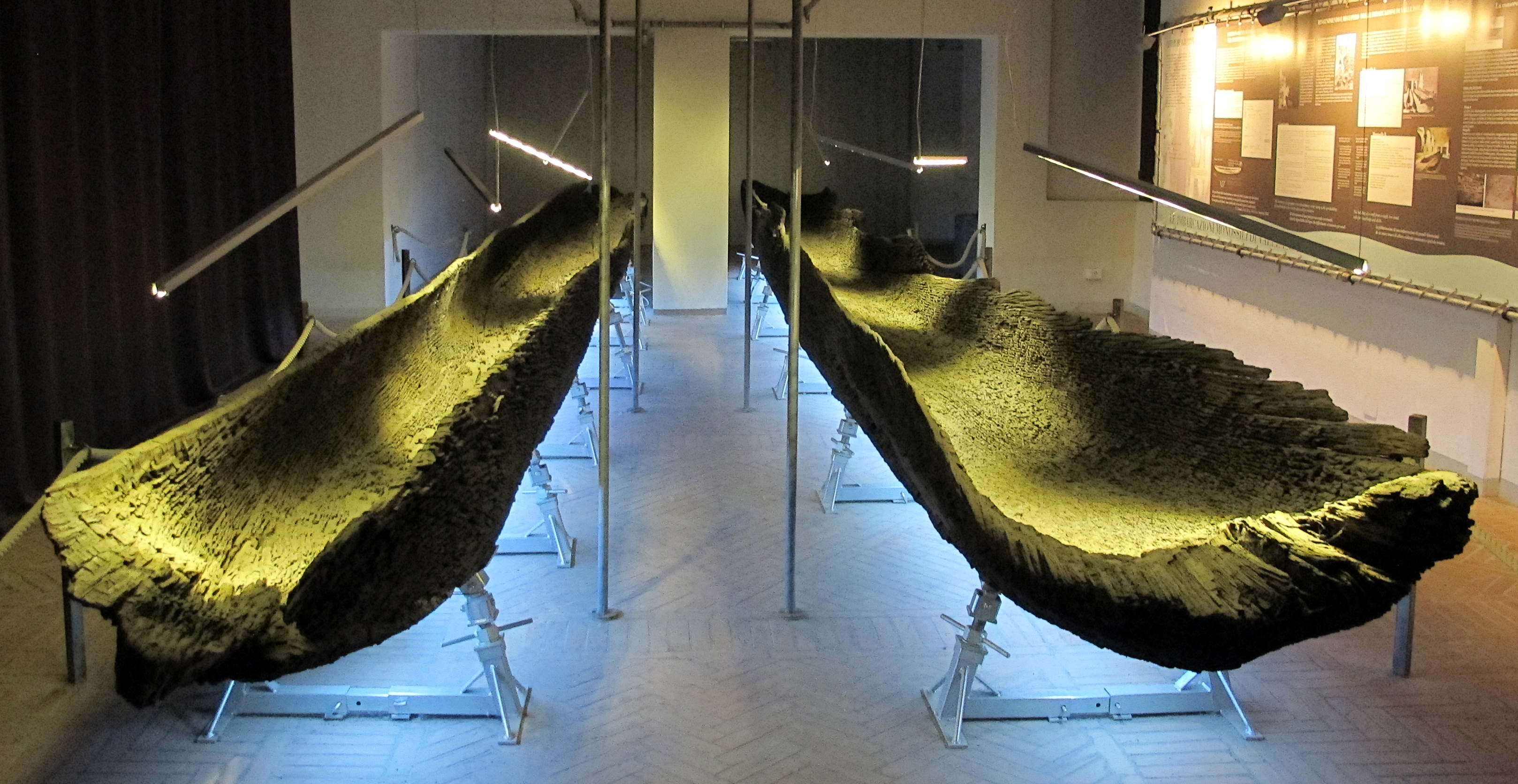 Museo Archeologico Nazionale - MIBAC This is a photo of a monument which is part of cultural heritage of Italy.